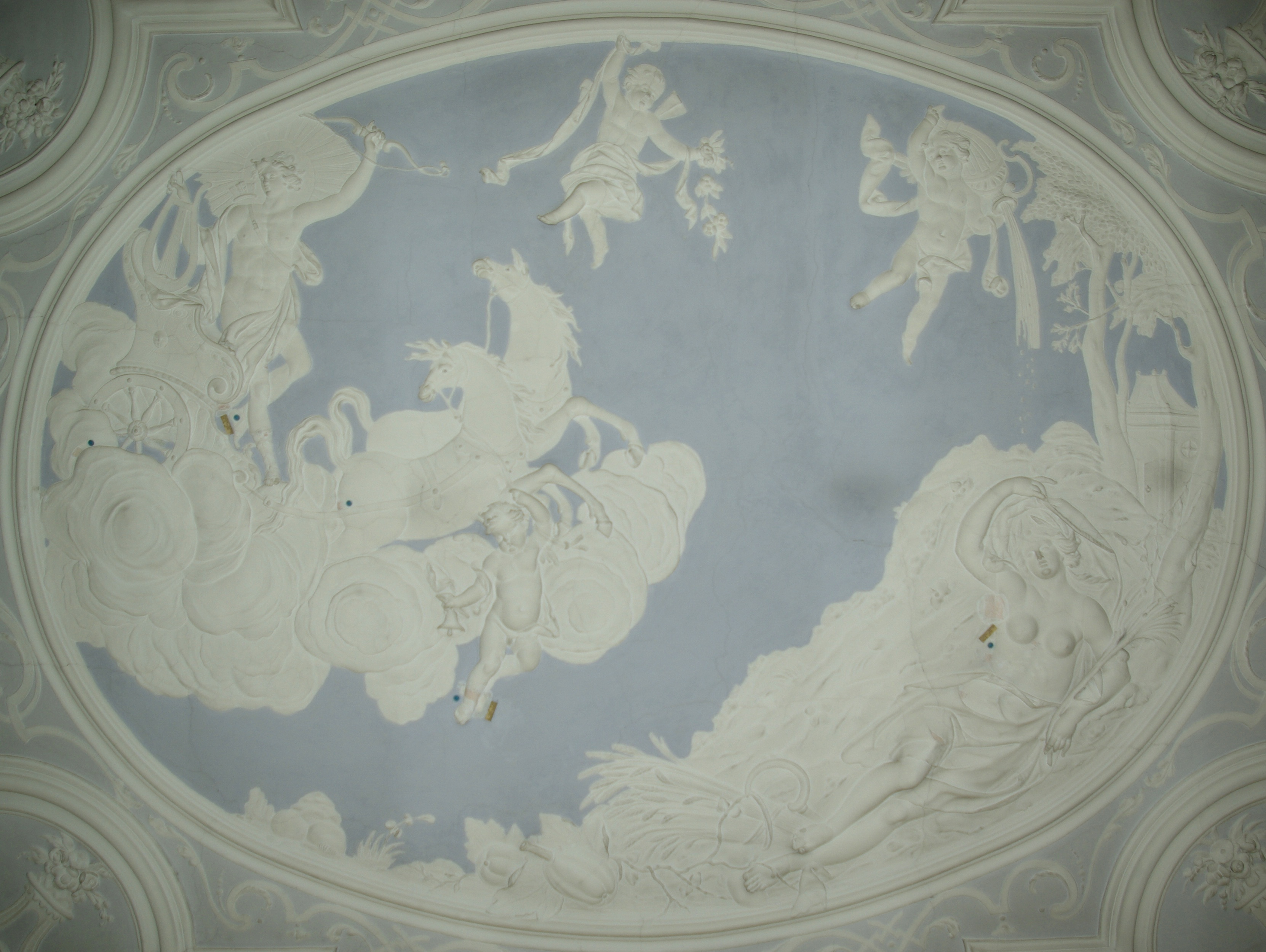 Stuckdecke im Festsaal des Egloffsteinschen Palais in Erlangen